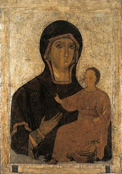 Богоматерь Одигитрия, XIII в. (на обороте I «Константин и Елена», XVII в., запись XVIII—XIX вв.) Рязанский историко-архитектурный музей-заповедник, инв. № 9. 122 X 86. Дерево, паволока, пропитанная ароматическими смолами, левкас, темпера.